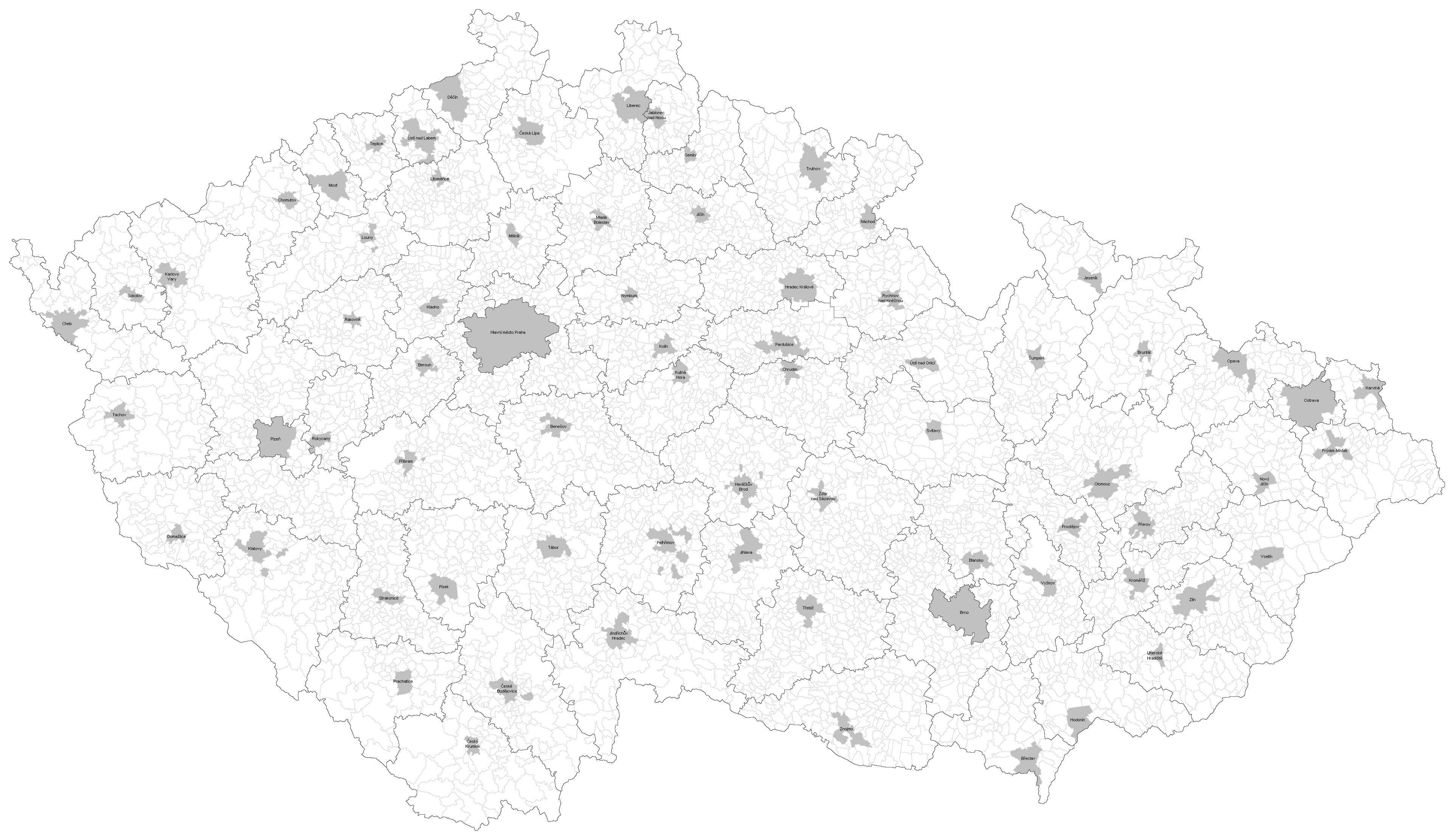 Slepá mapa okresů, okresních měst a hlavního města v České republice